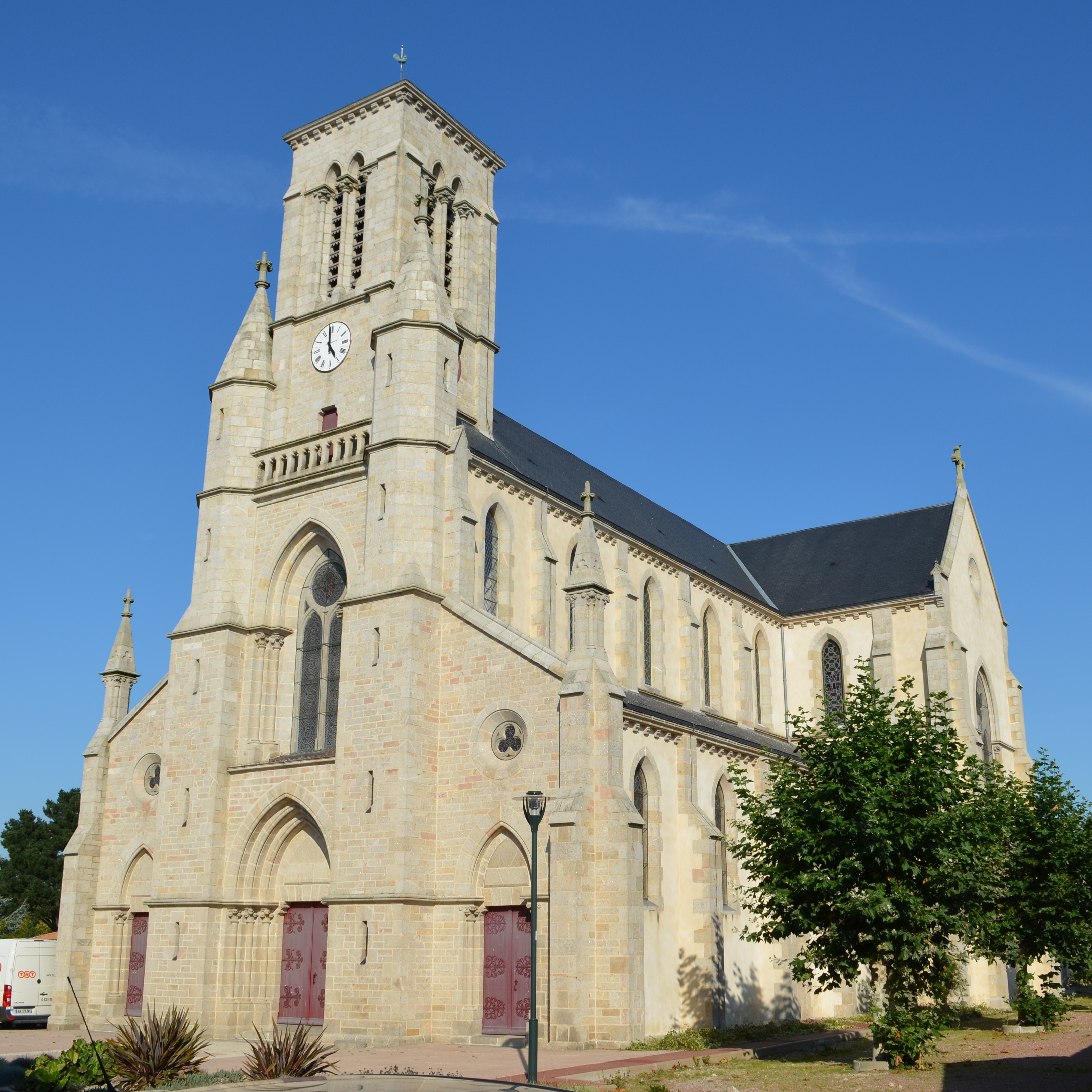 Église de Belleville-sur-Vie (Vendée)